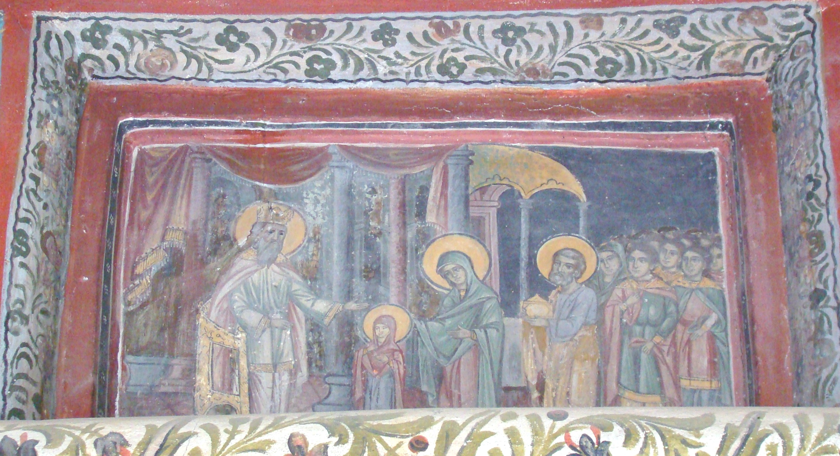 Biserica "Intrarea în Biserică a Maicii Domnului"-Brad-Bătușari, municipiul Curtea de Argeș, Str. Vlaicu Vodă 8